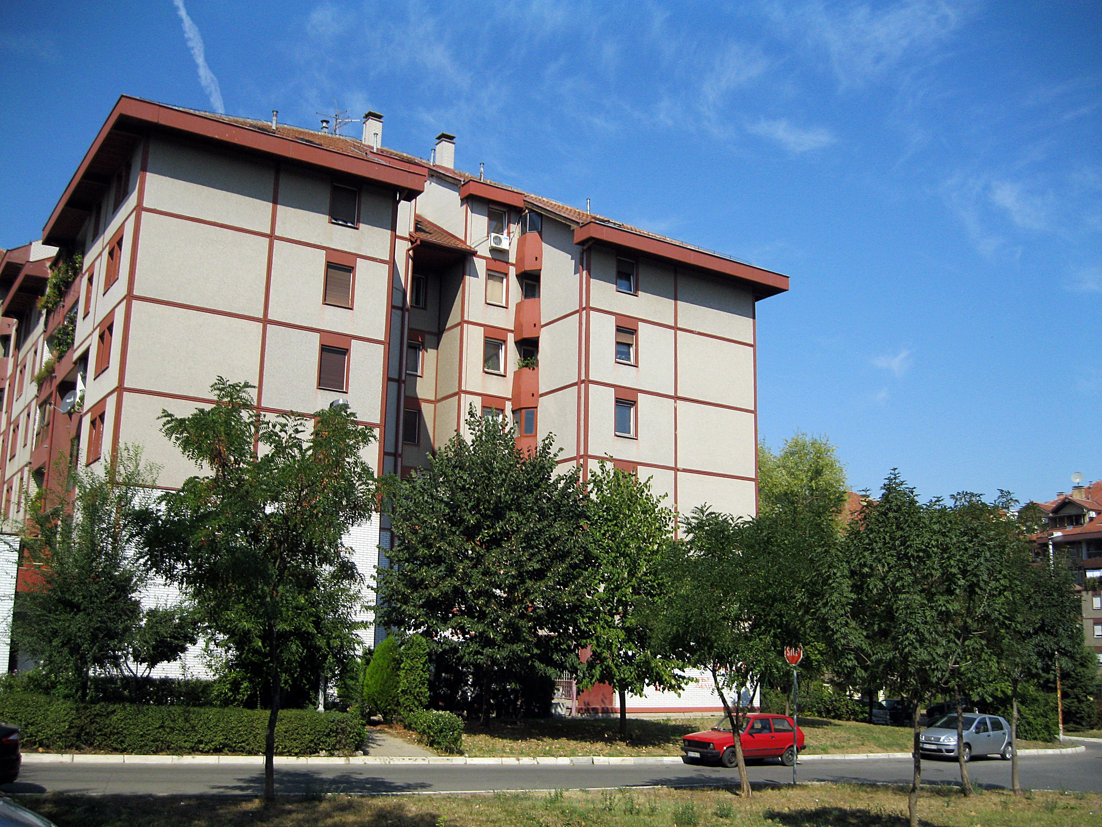 Зграда на Бежанијској коси